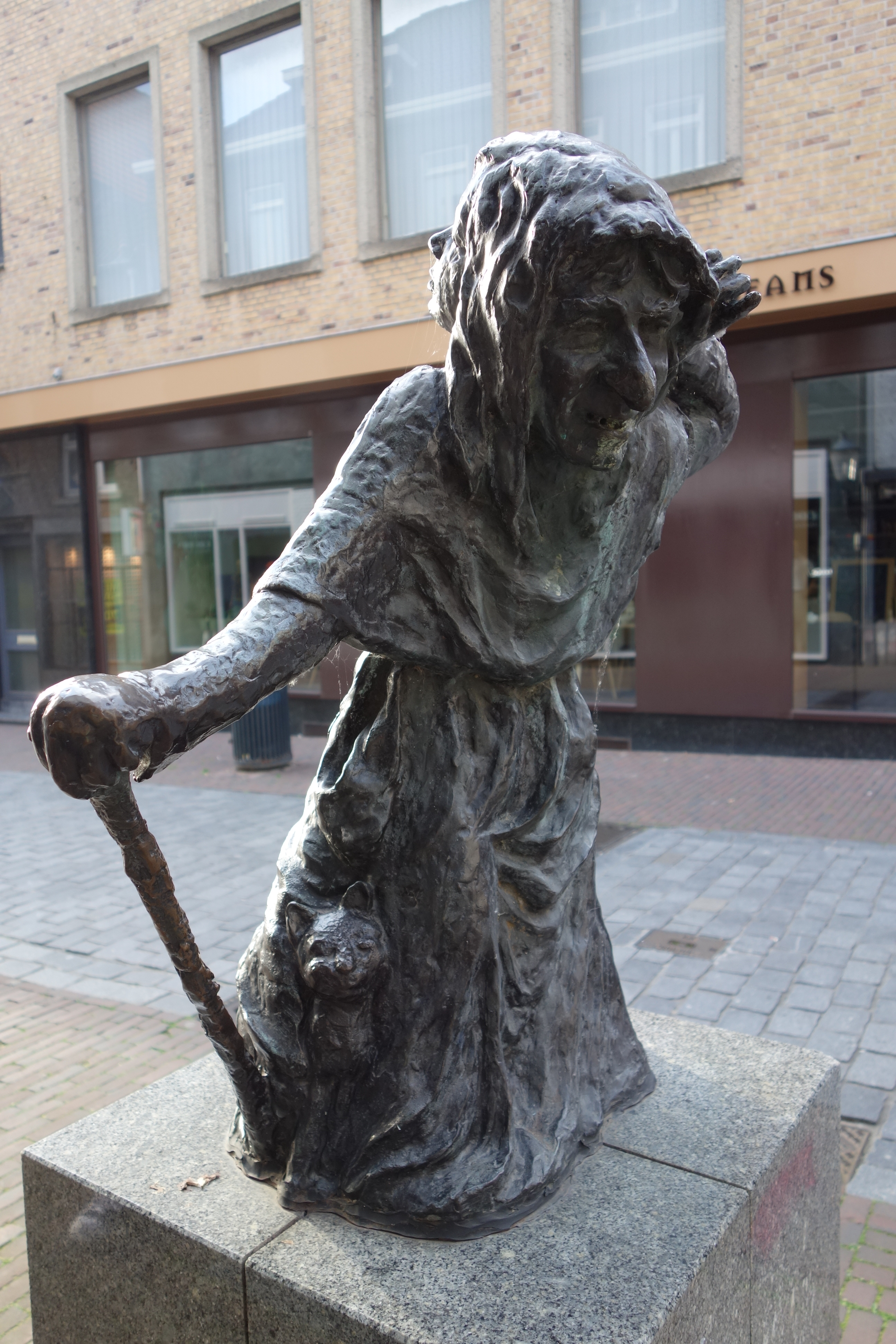 Beeld van Hiacinthe de heks in de Brugstraat in Roermond. Deze zijde toont Hiacinthe als een oude vrouw, de jonge vrouw is gedeeltelijk te zien aan de linkerzijde van het hoofd.